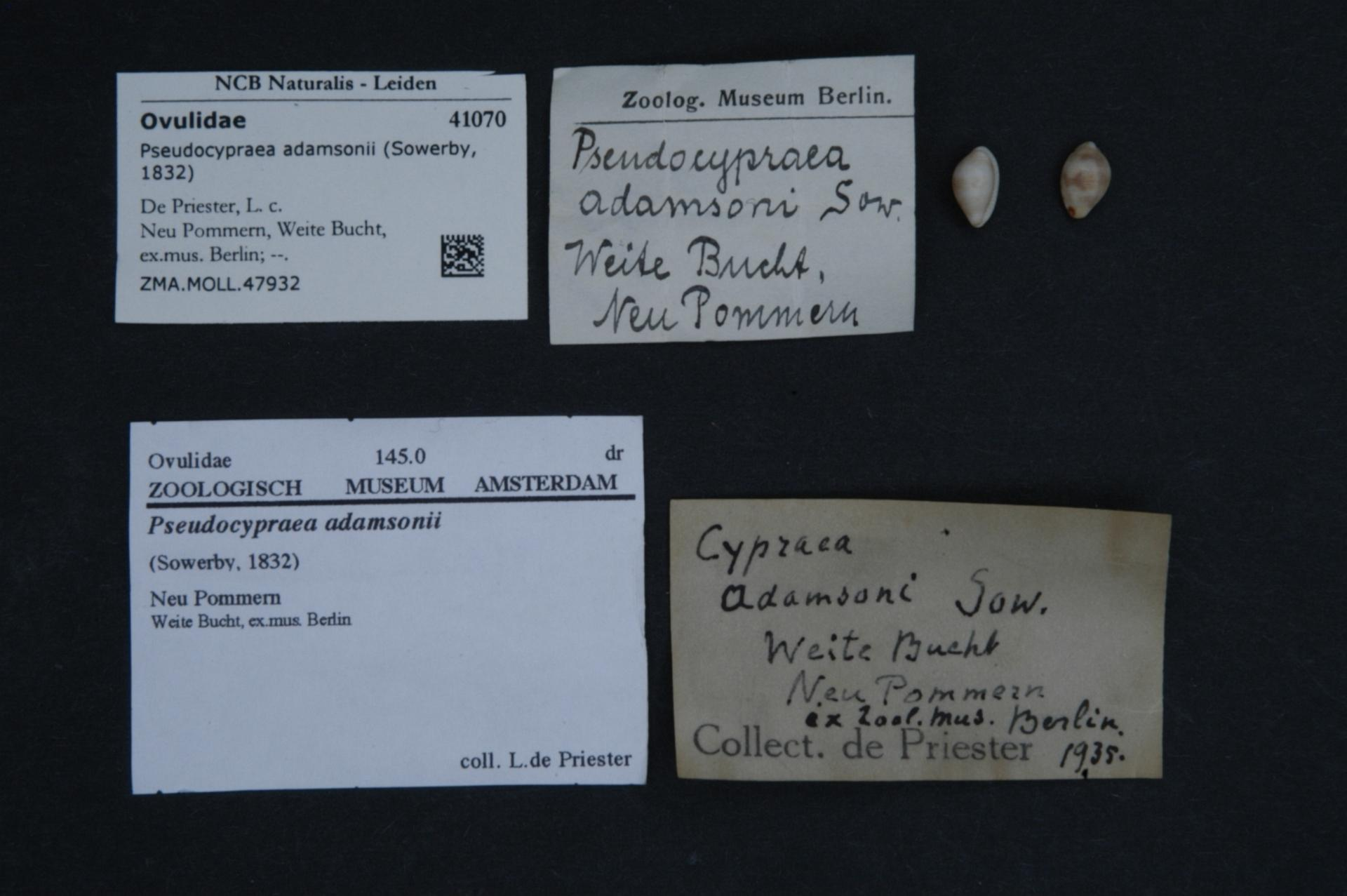 Pseudocypraea adamsonii (Gray, 1832)